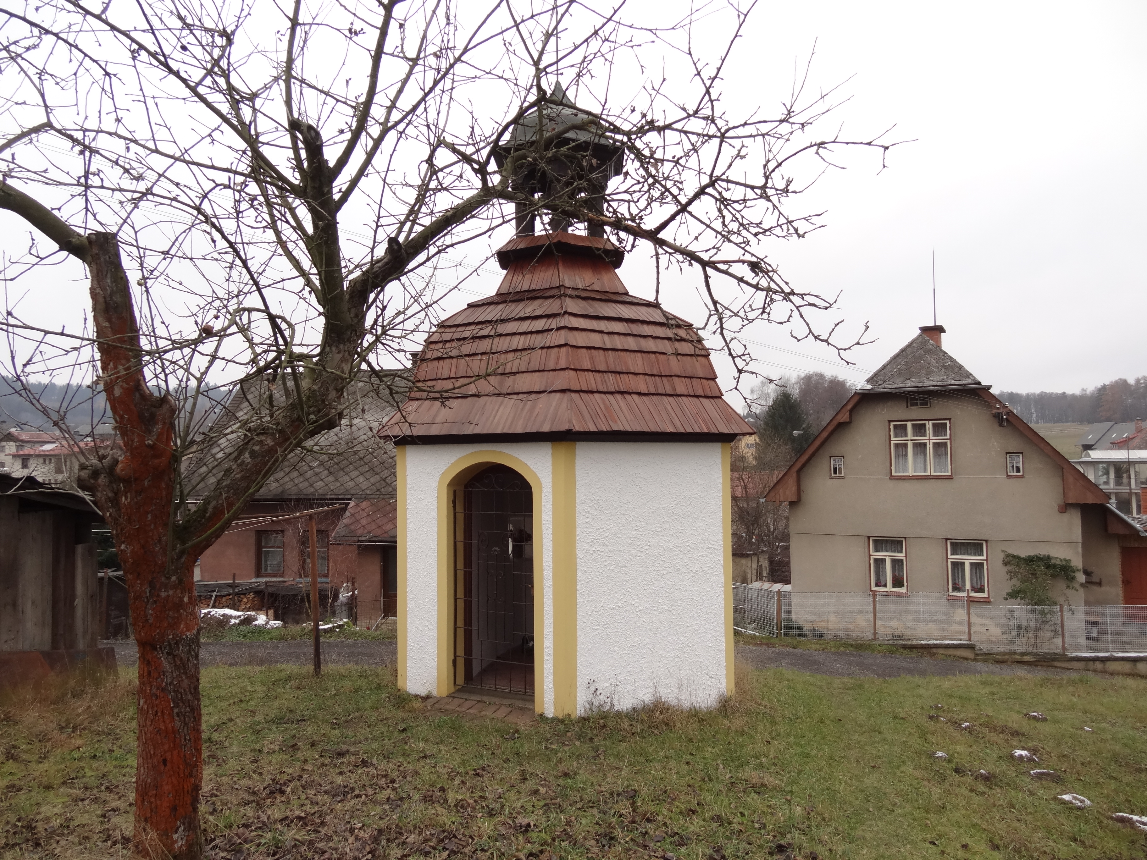 Smrčí - kaplička